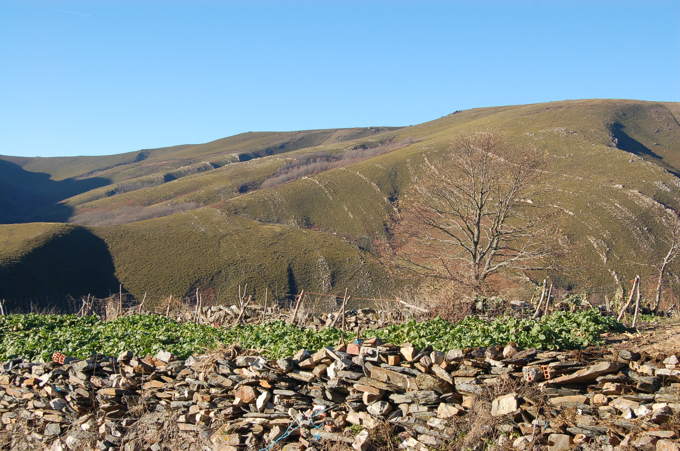 Vista de Queixa desde As Taboazas